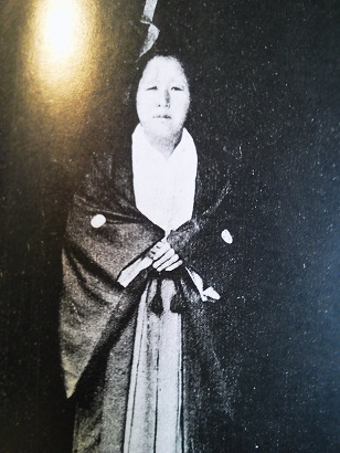 親さまのお姿